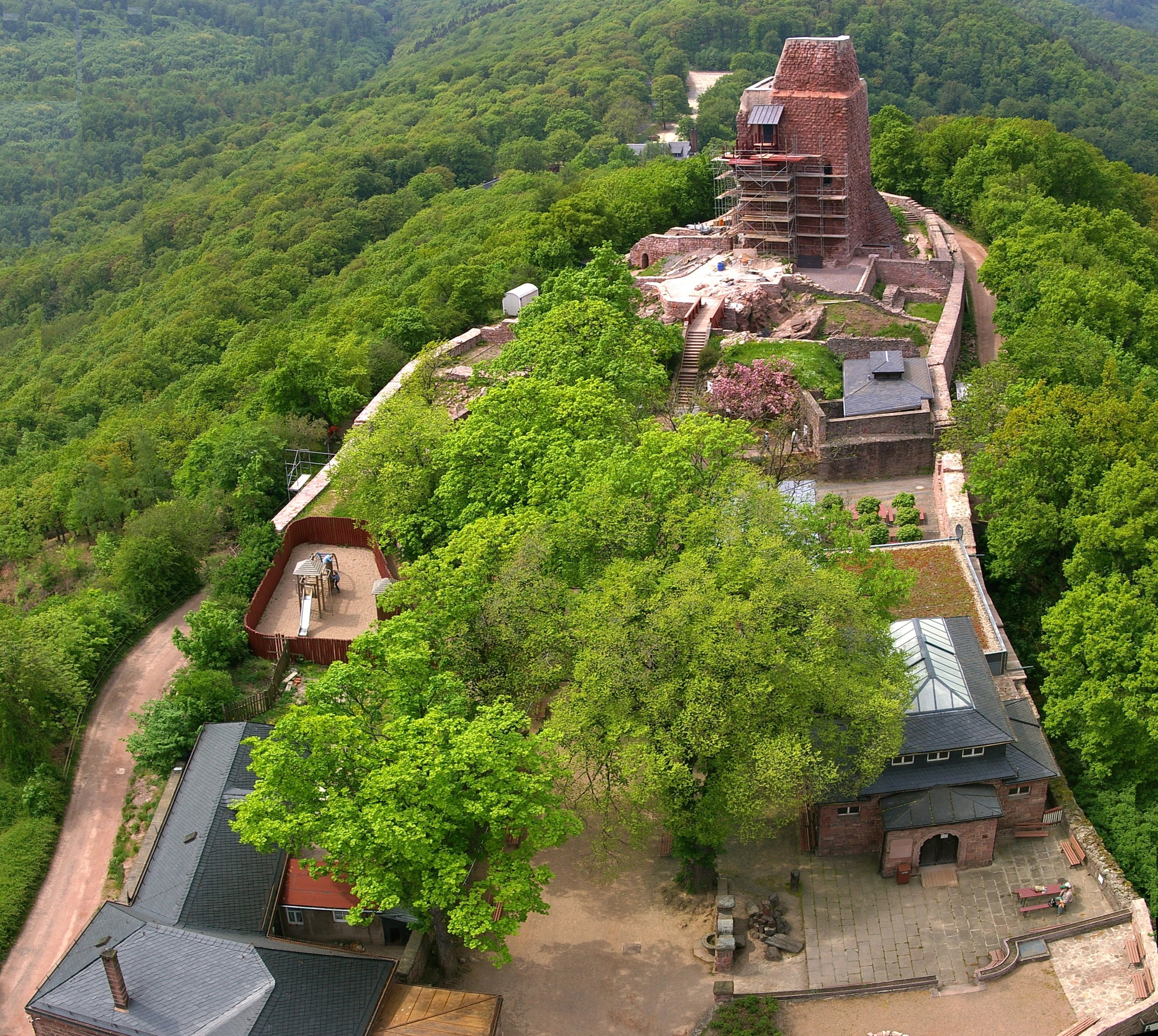 Kyffhäuserdenkmal - Anlage vom Turm aus